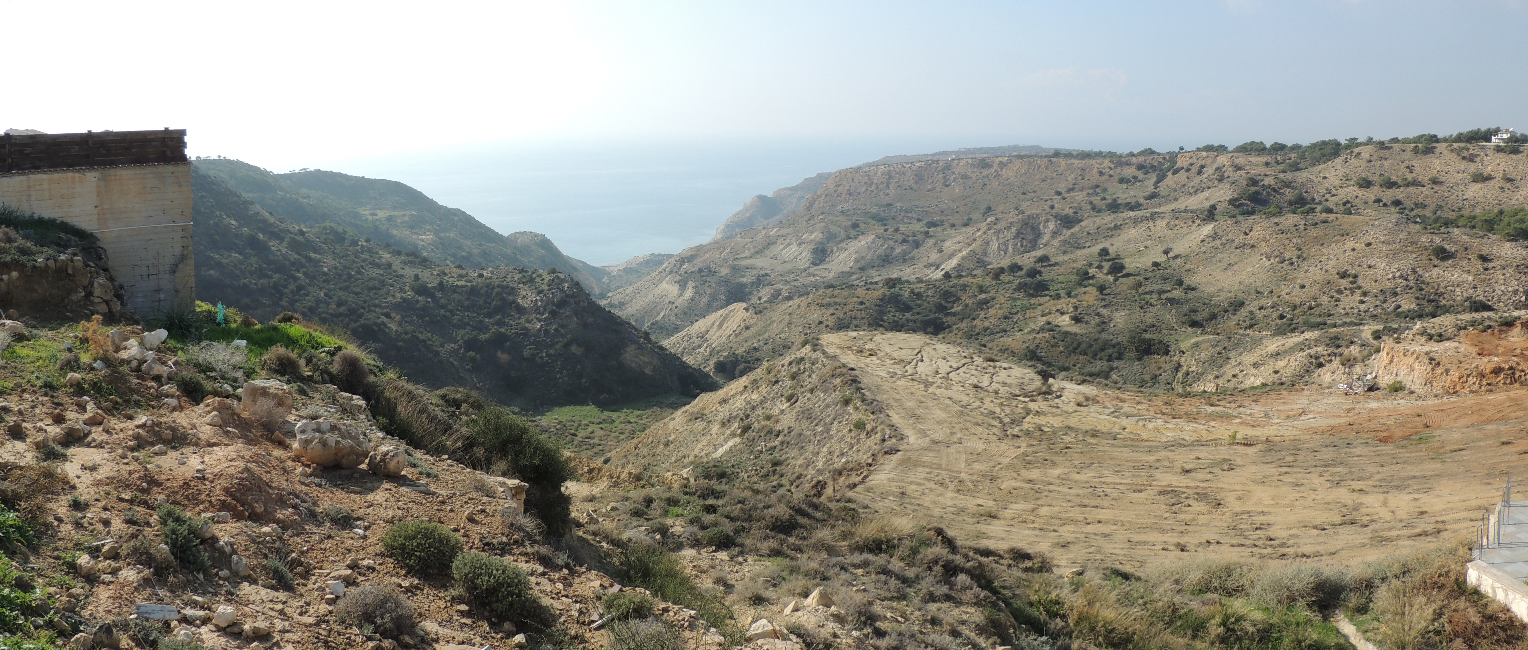 Pissouri, Cyprus